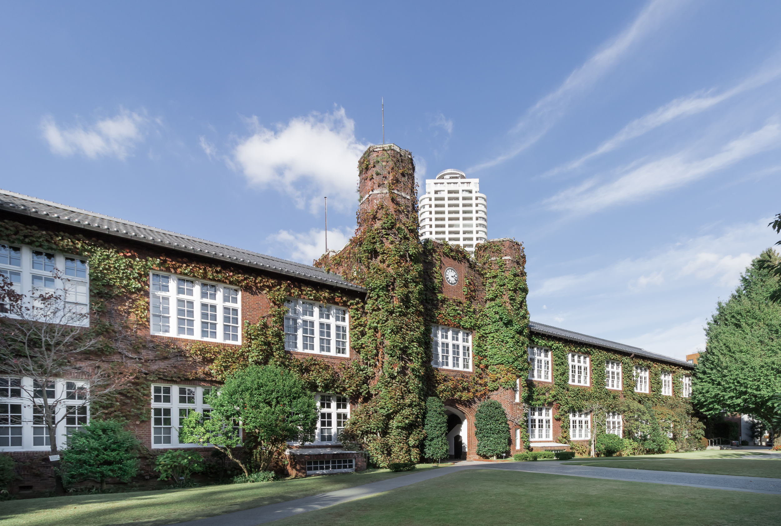 立教大学、池袋キャンパス、本館（モリス館）。東京都選定歴史的建造物。